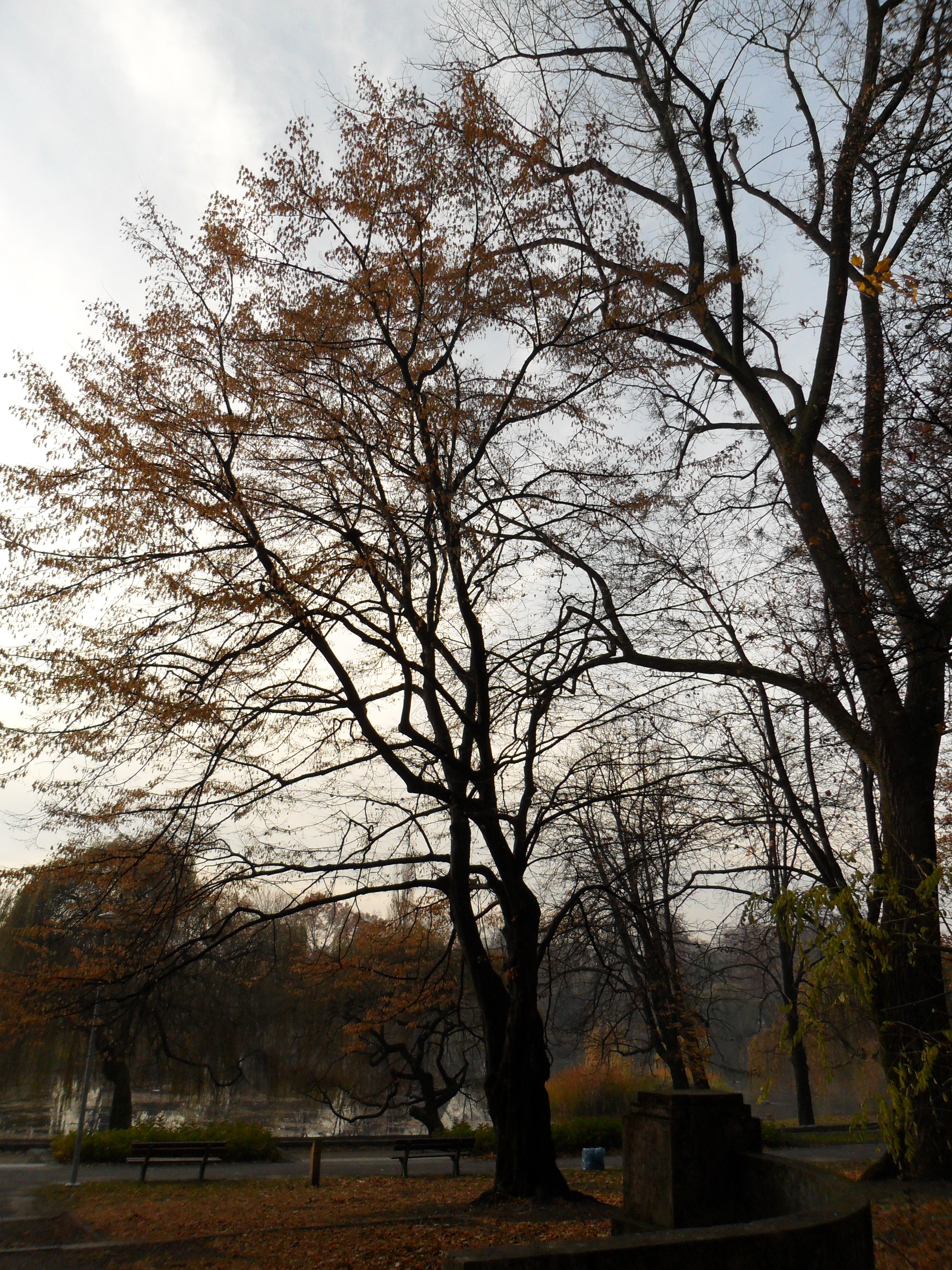 Grab pospolity w parku im. Miasta Roth w Raciborzu. Ustanowiony pomnikiem przyrody.